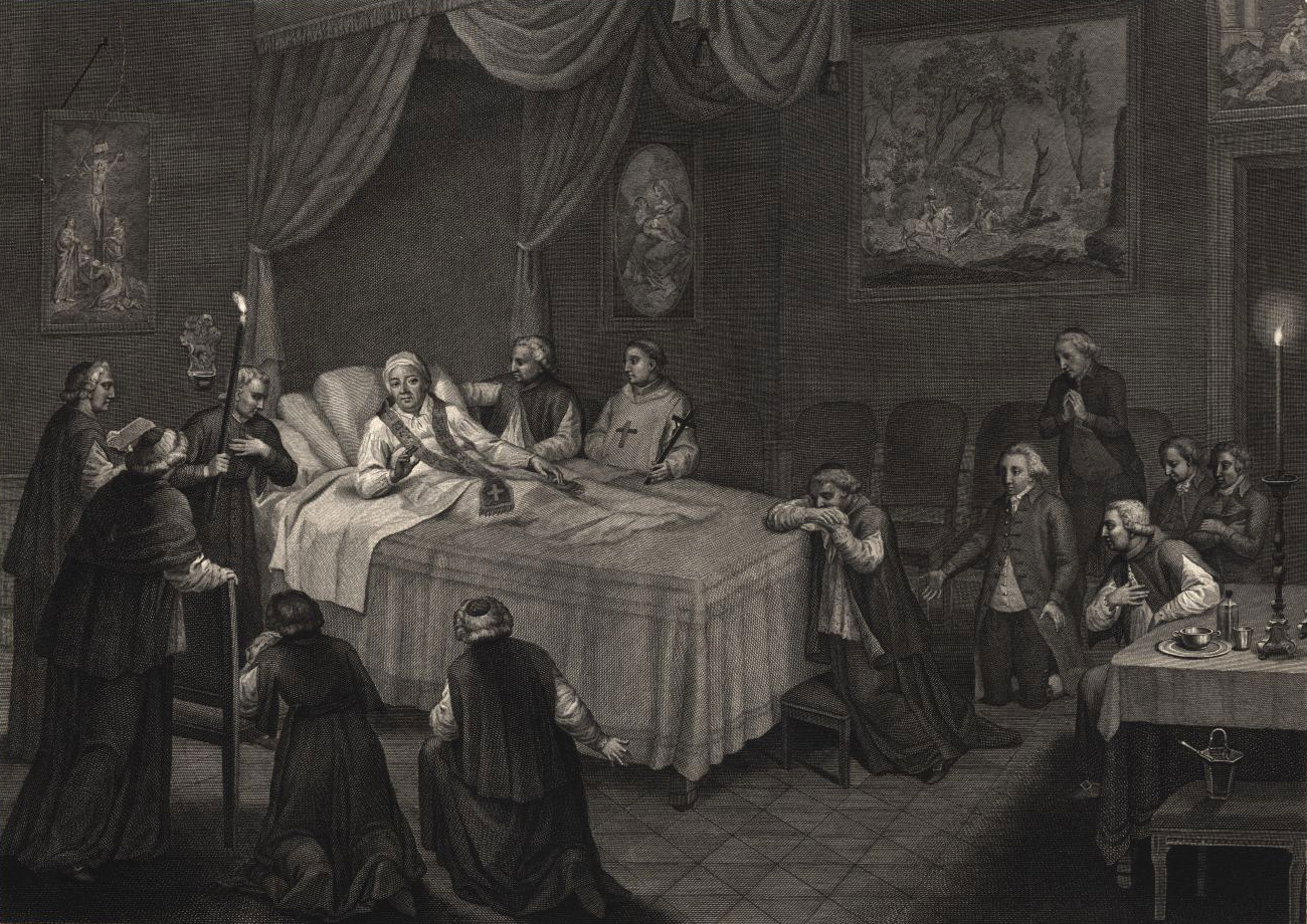 Morte di S. S. Pio VI, seguita nel palazzo della Cittadella di Valenza .